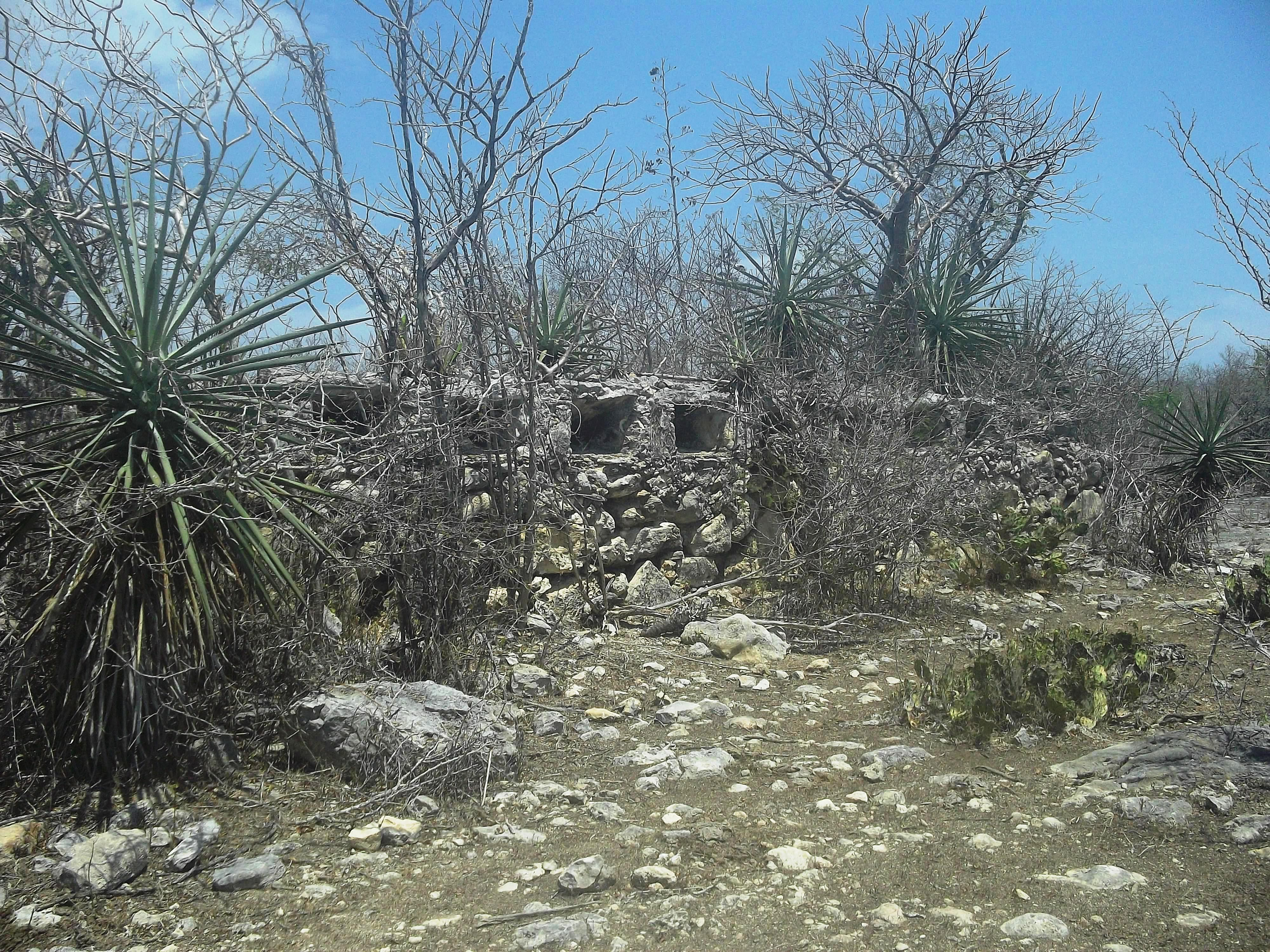 Trincheras coloniales de Chicxulub Puerto, Yucatán.